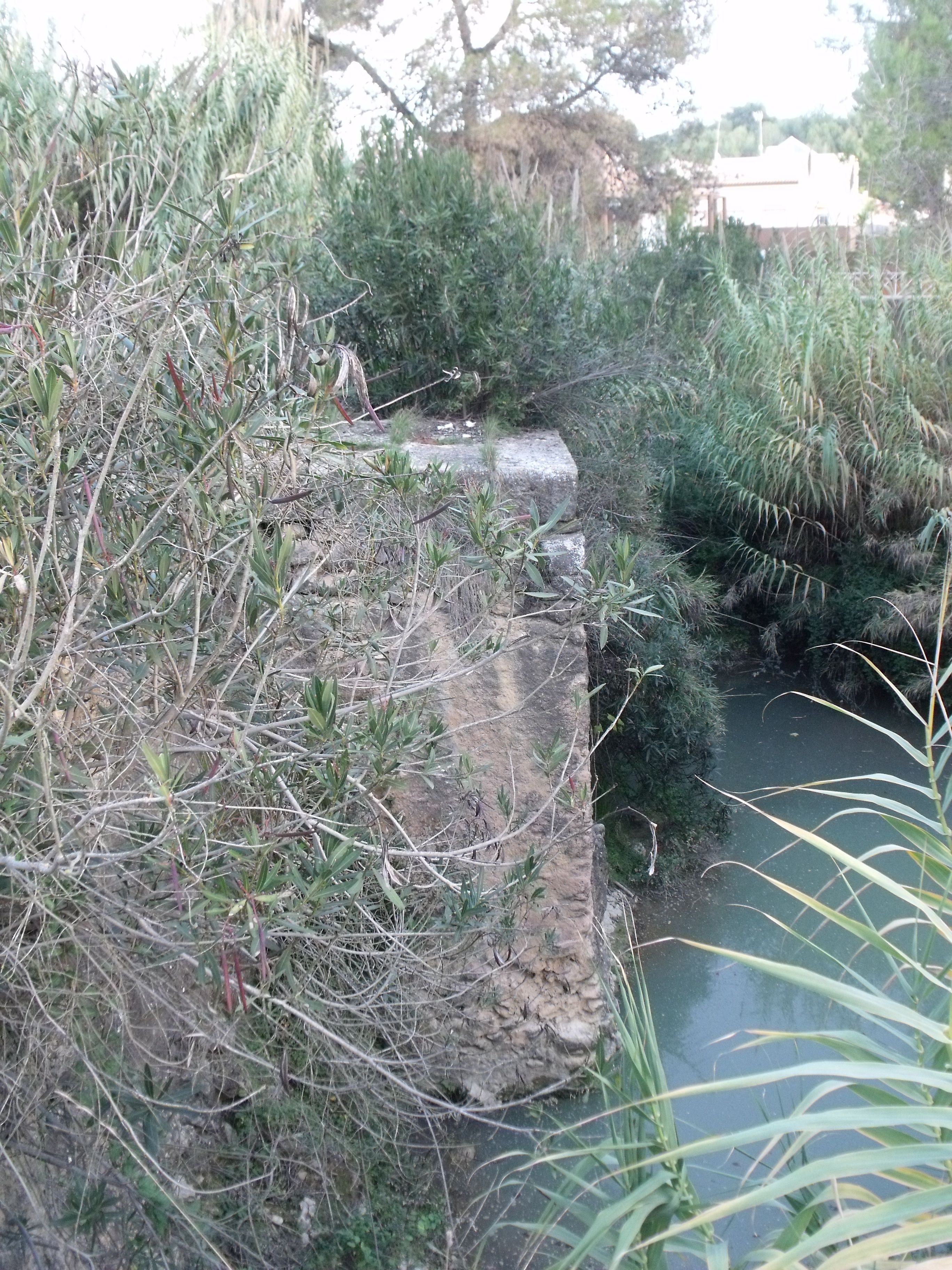 Presa del Poyo, sobre el Barranco del Murtal, en Godelleta.